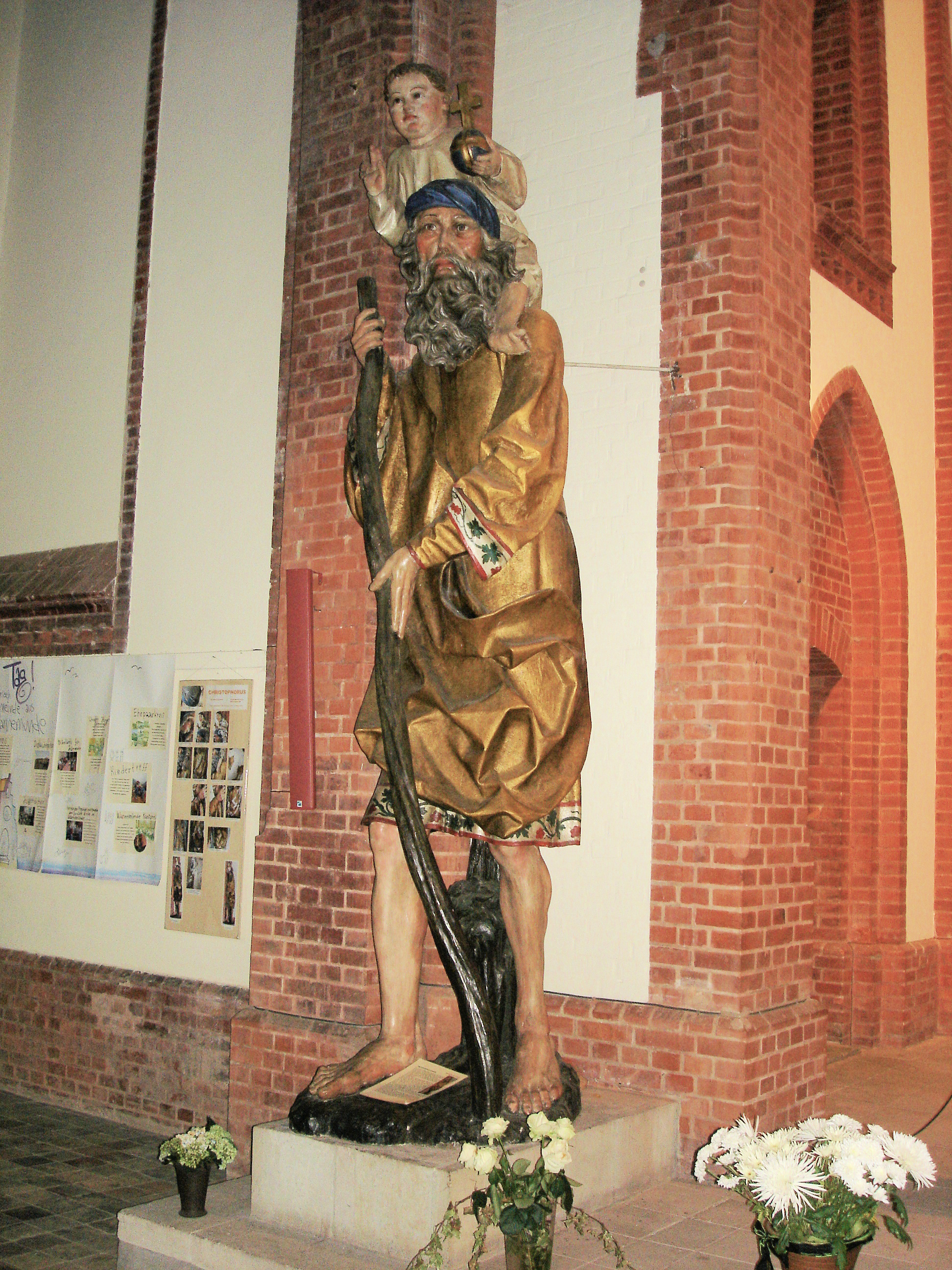 Kirche Warnemünde Skulptur des Christophorus